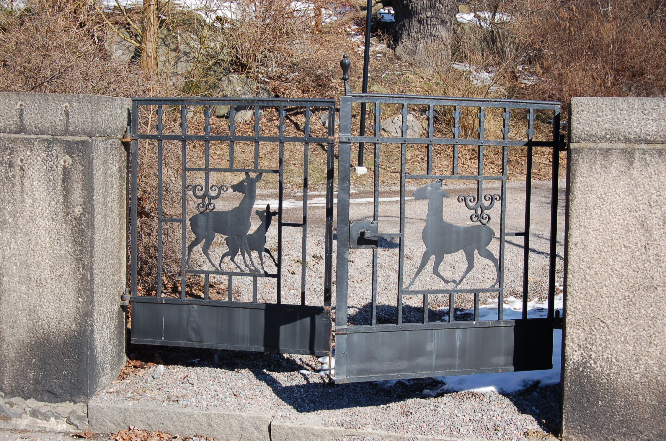 Smida grindar till Hjorthagens kyrka i Stockholm